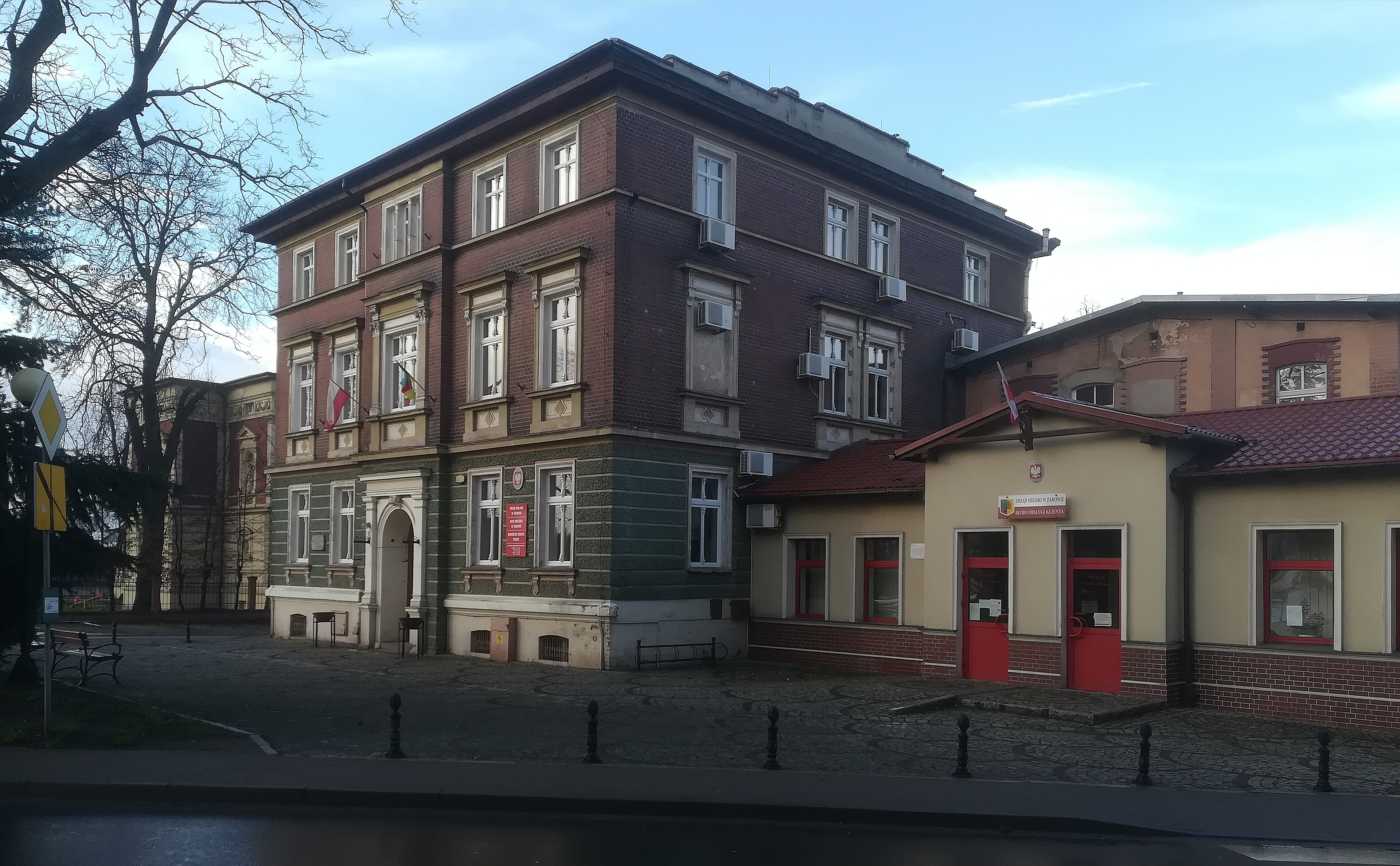 Fragment centrum Żarowa. Urząd Miejski.